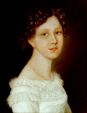 Portrait of Ulrike von Levetzow